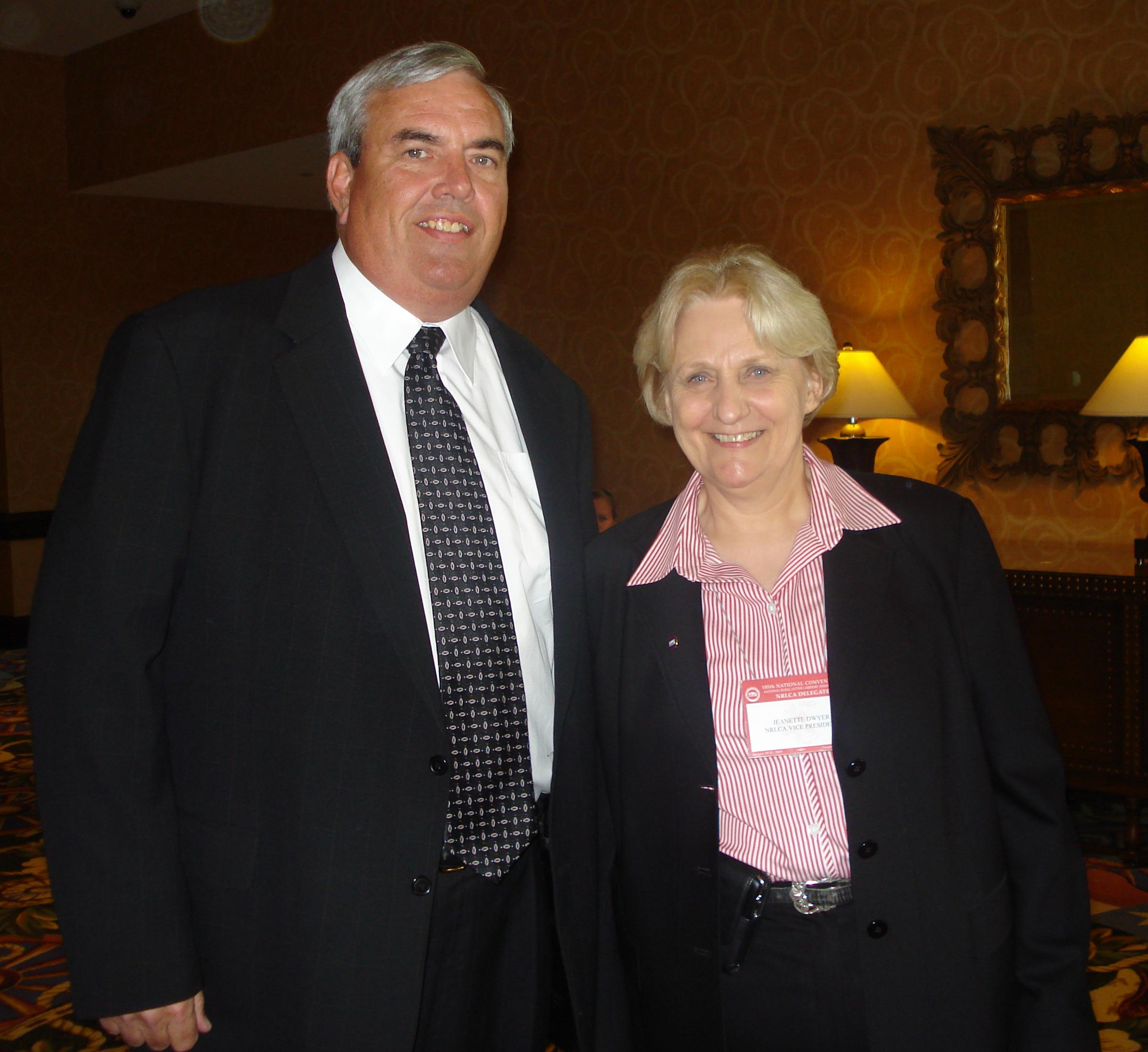 PMG Potter & NRLCA VP Dwyer